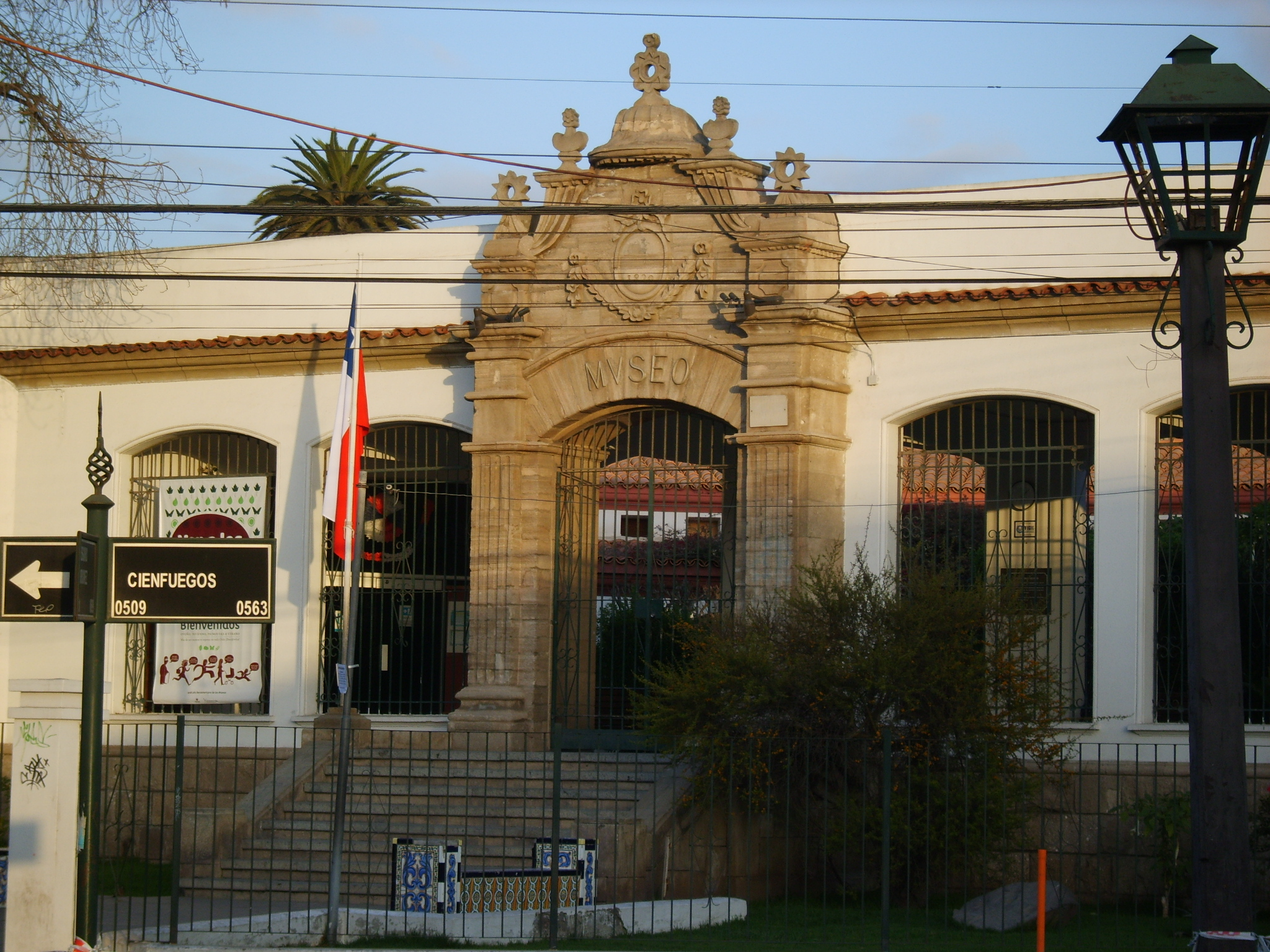 Museo Arqueológico de La Serena